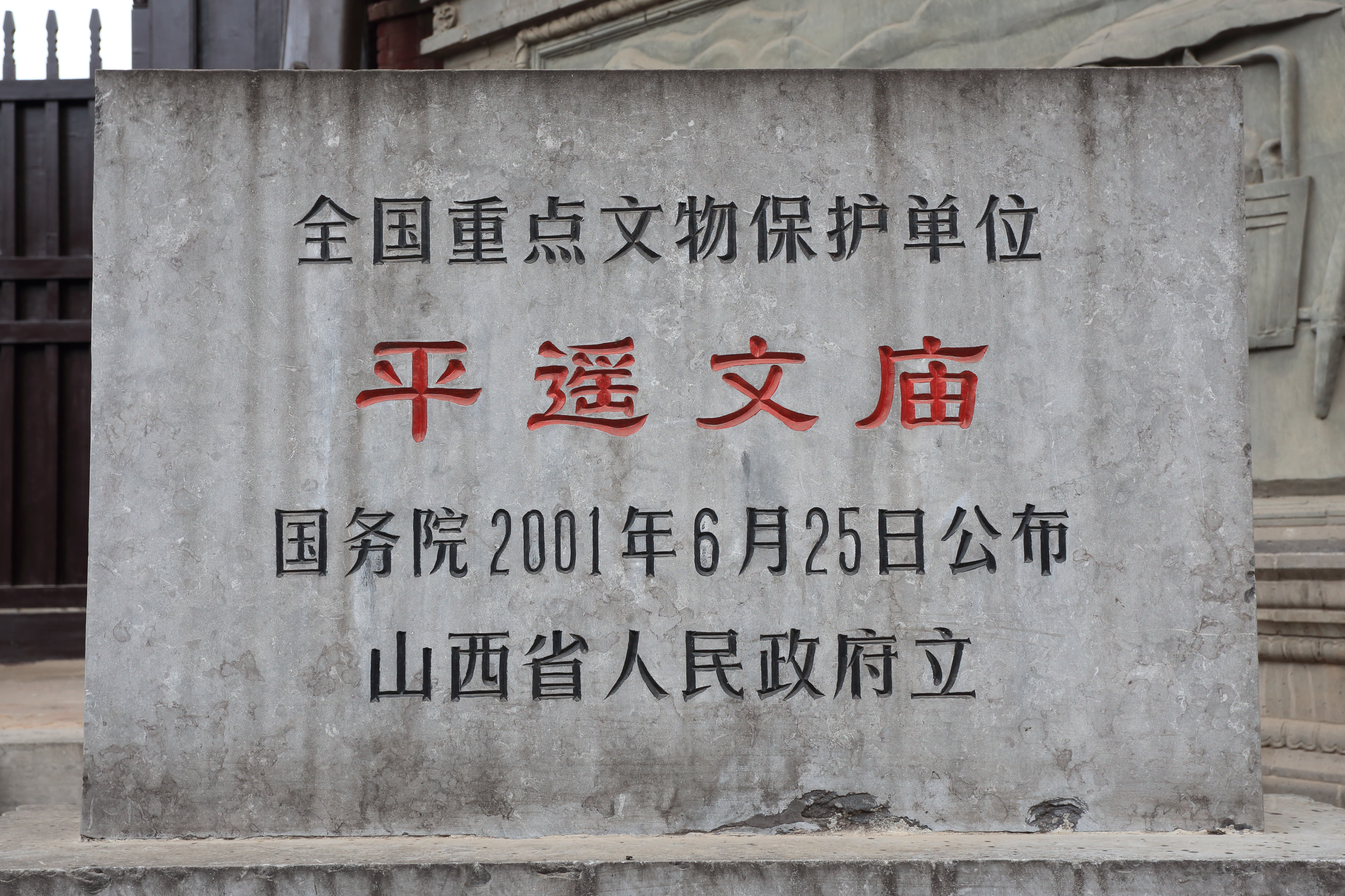 平遥文庙 —— 文保碑